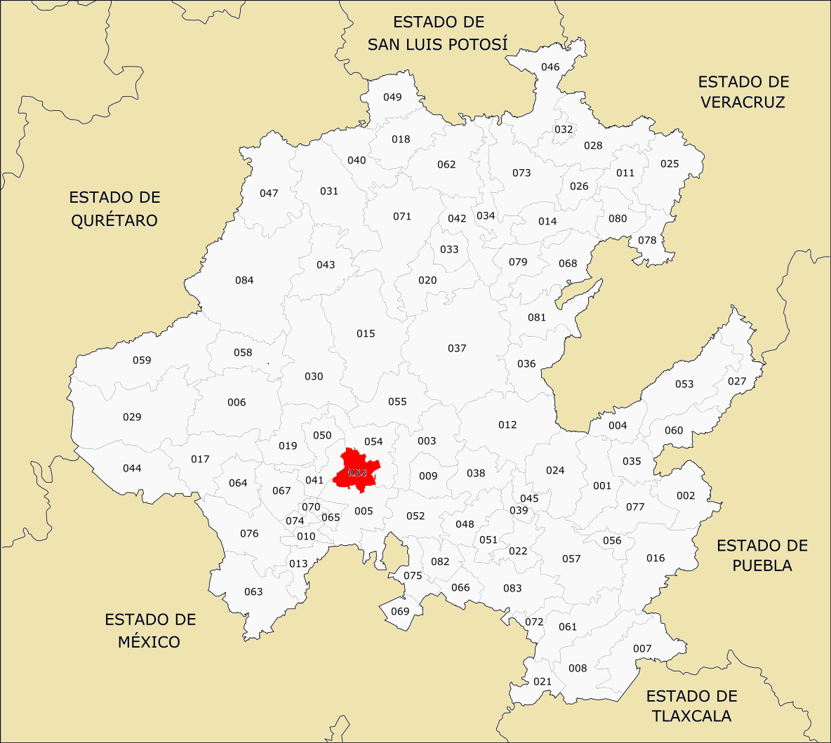 Municipios de Hidalgo